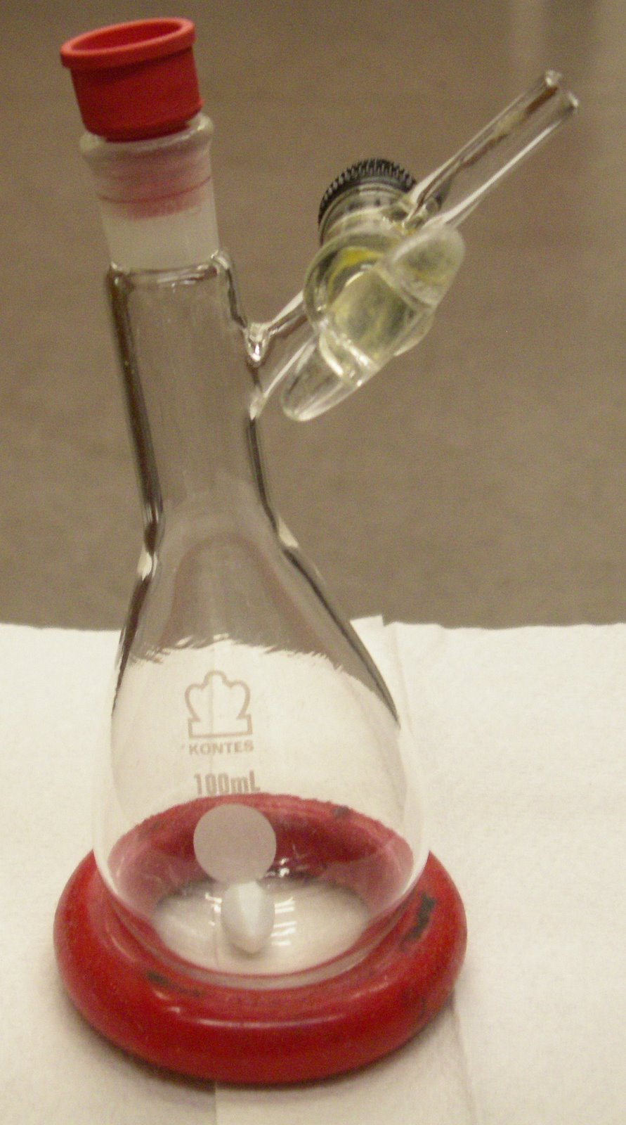 Standard Schlenk flask